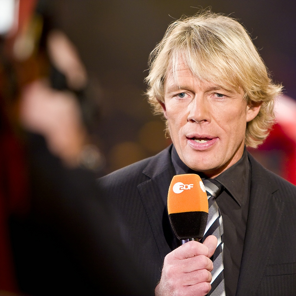 Boxkampf Oberhausen 01.11.2008 beim Interview mit Graciano Rocchigiani